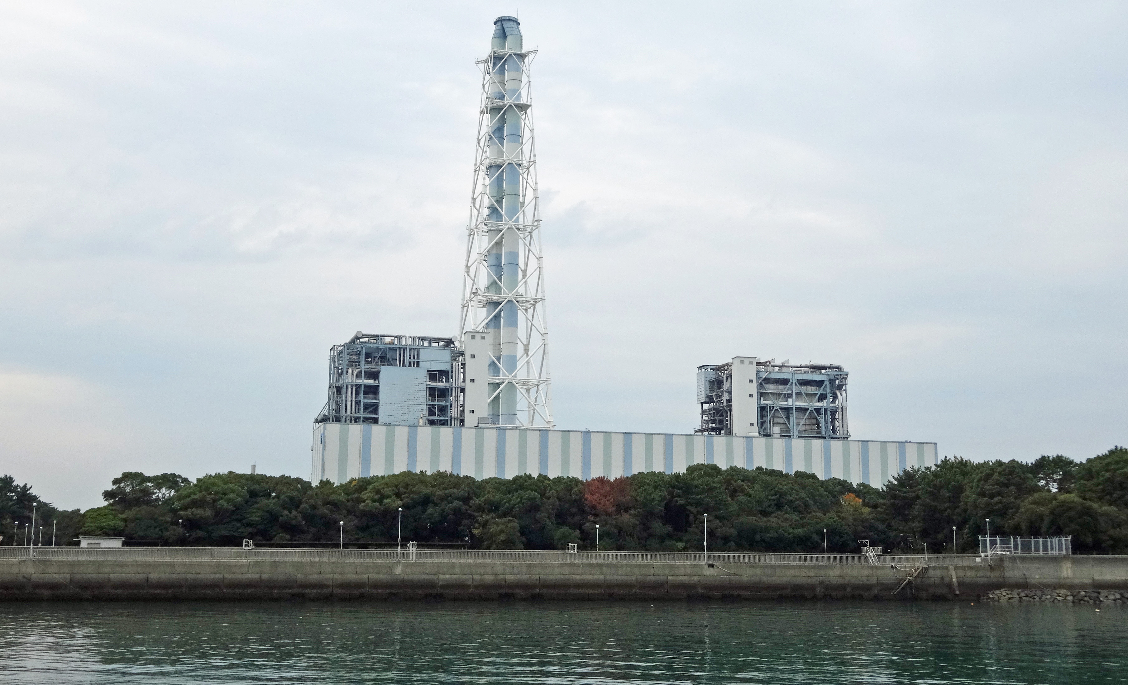 九州電力豊前発電所（火力）